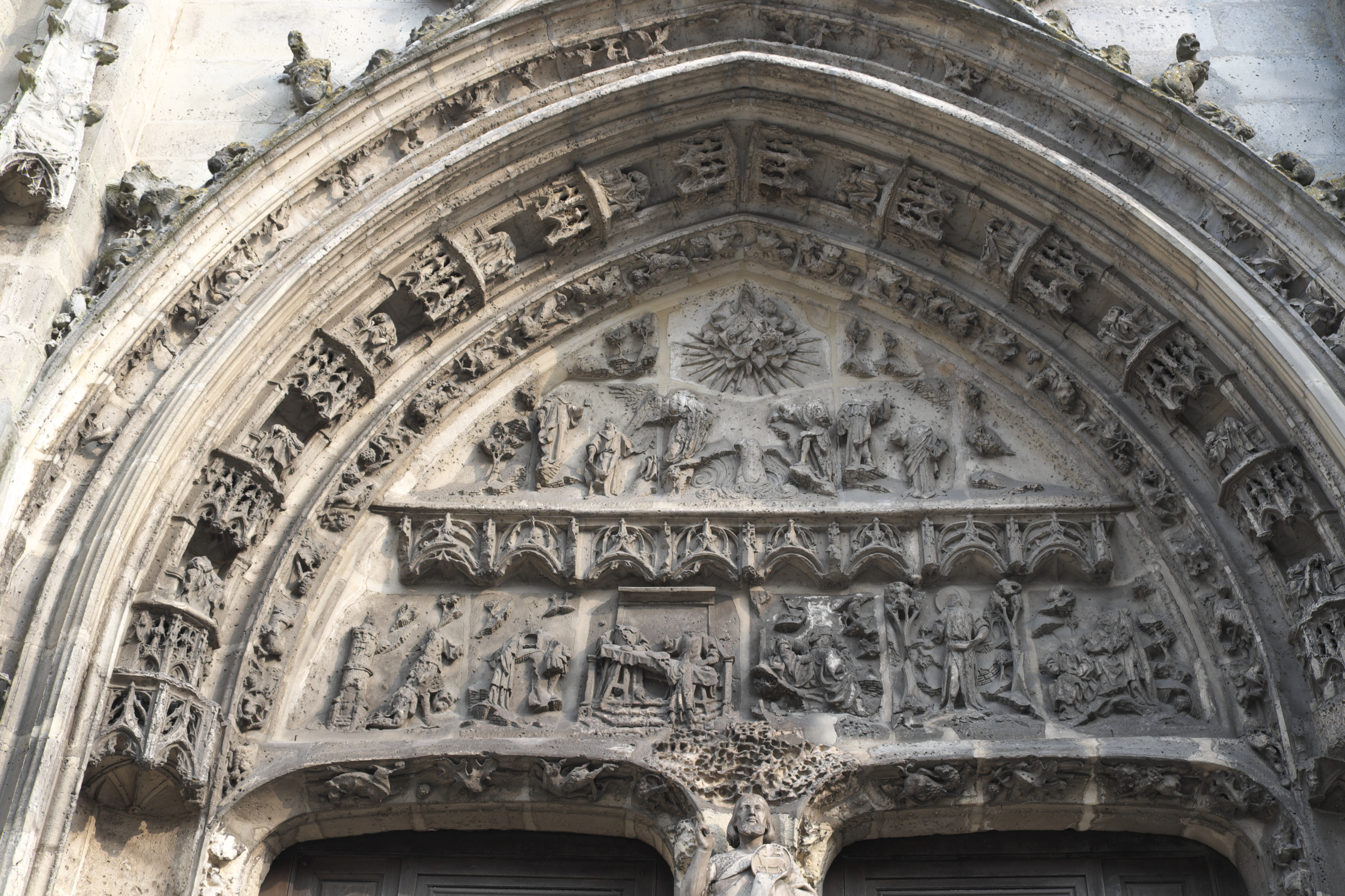 Katholische Pfarrkirche Saint-Jean-Baptiste (Johannes der Täufer) in Dammartin-en-Goële im Département Seine-et-Marne (Région Île-de-France/Frankreich), Tympanon am Portal